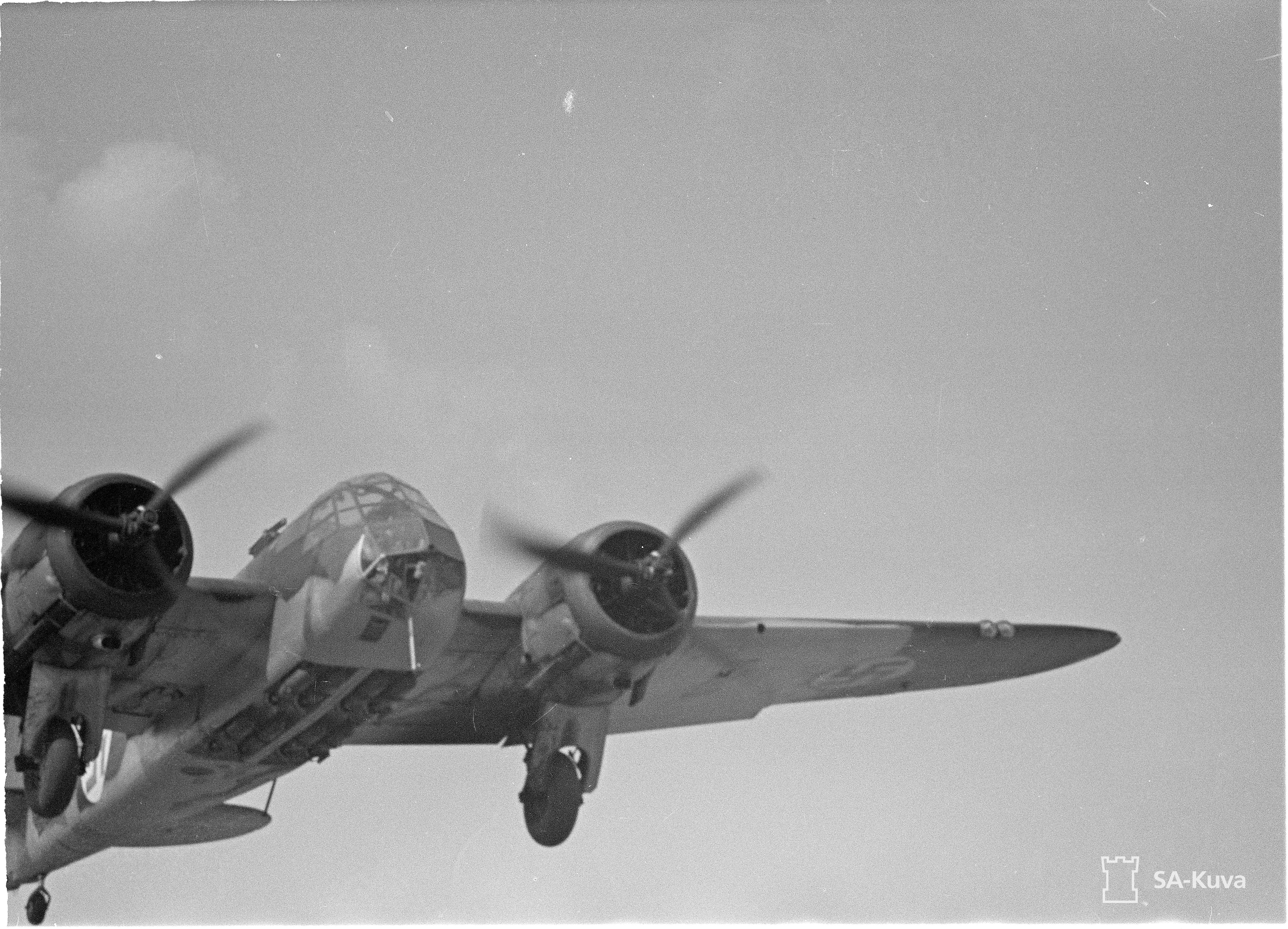 BL ilmassa. (Kuvassa on Bristol Blenheim -pommikone). Kuvauspaikka: Mikkelin kenttä ja laivueen esikunta